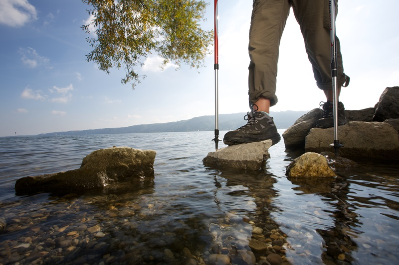 1. Strecken-Premiumwanderweg am Bodensee. Der Wanderweg verläuft direkt am Ufer des Sees.